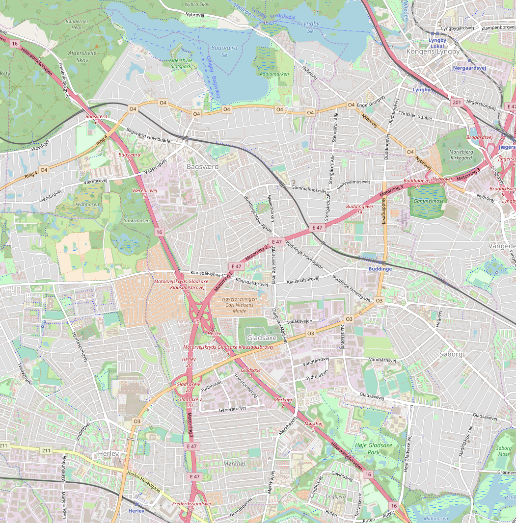 Kort over Gladsaxe Kommune fra OpenStreetMap Kortets geografiske grænser: N: 55.7778° S: 55.7167° W: 12.4153° E: 12.5222°